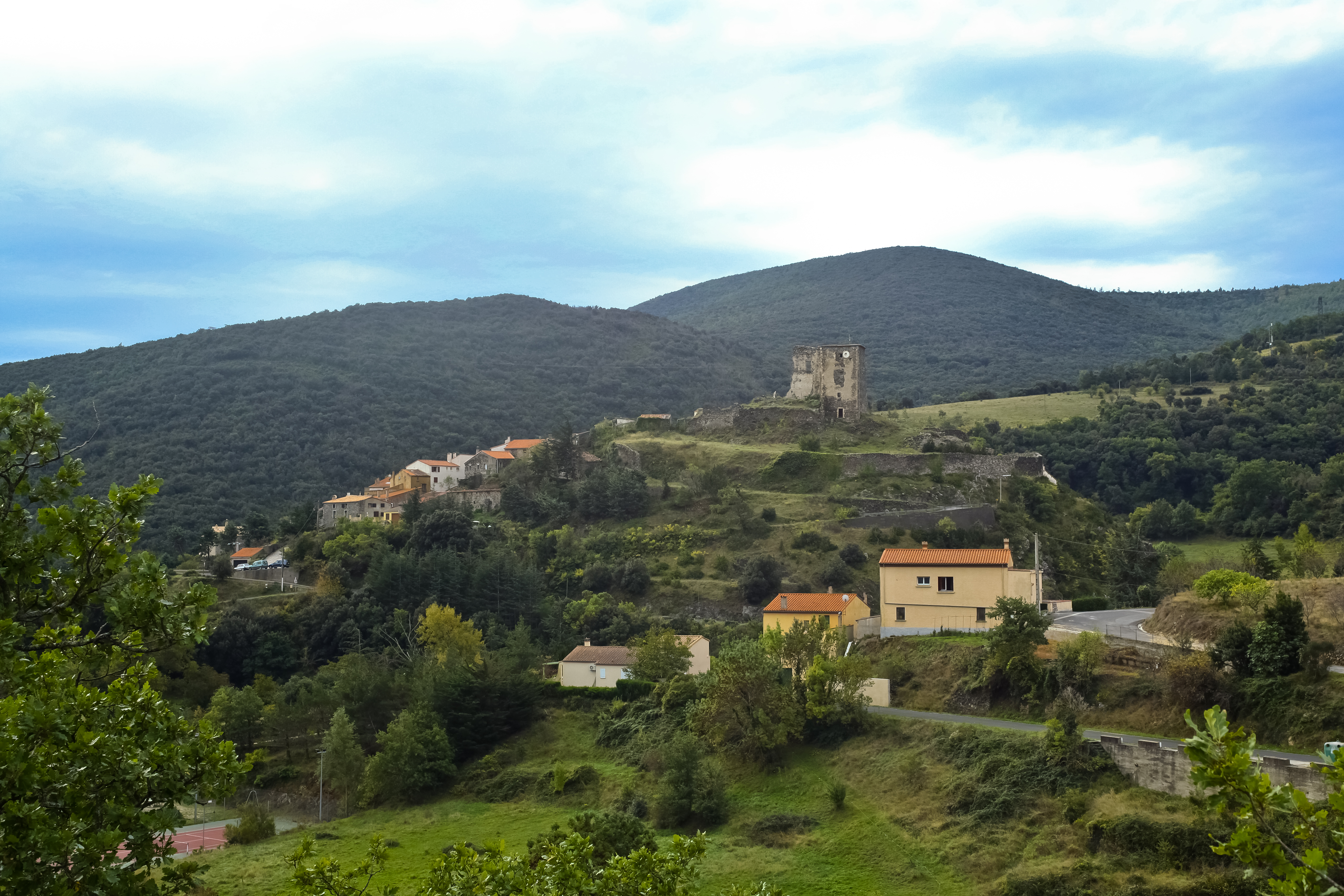 Le village du Vivier, Pyrénées-Orientales